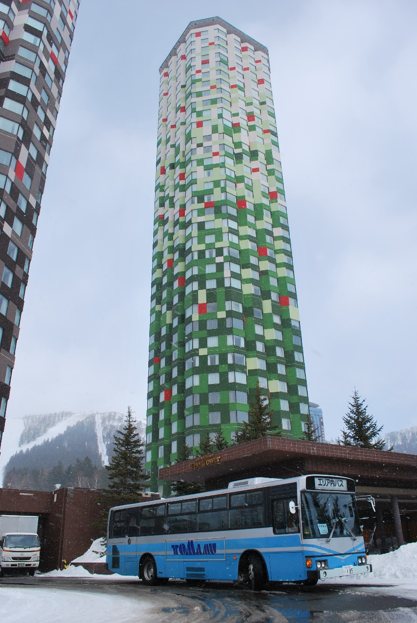 北海道勇払郡占冠村「アルファリゾートトマム」の宿泊施設の一つ、ザ・タワーと施設内を循環するエリア内バス。